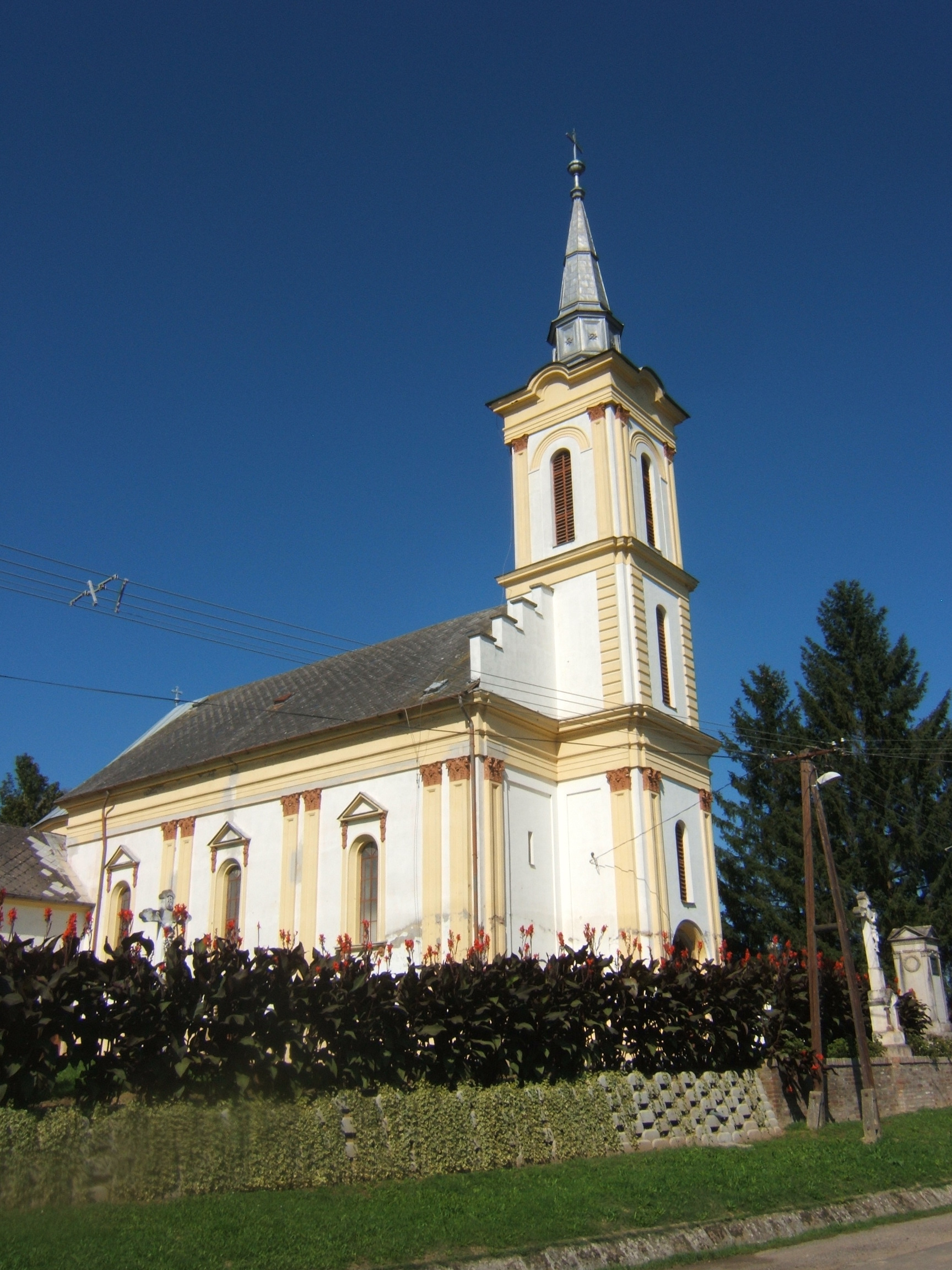 Baranya megye, Almamellék Szent Kereszt feltalálása templom (1890)